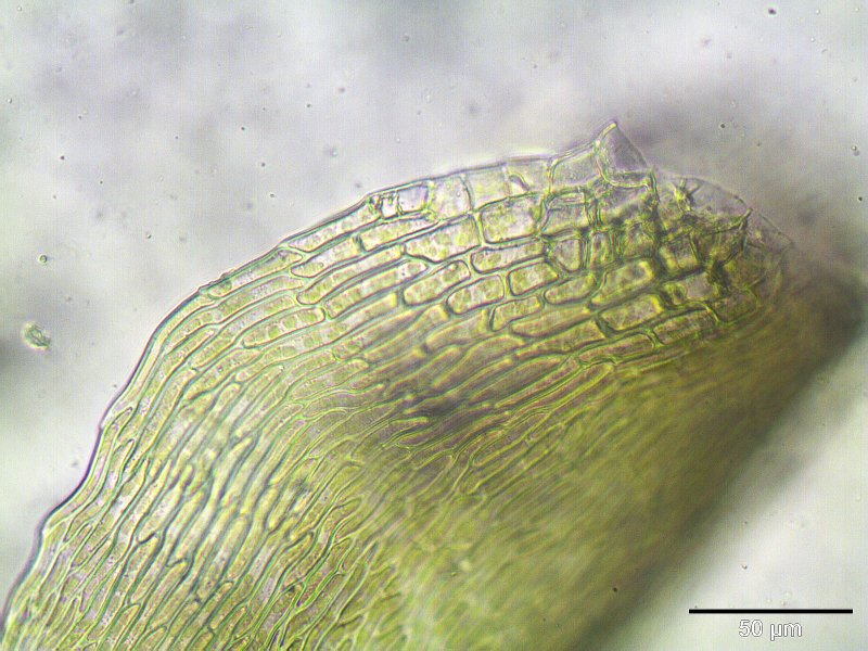 Bärlapp-Sichelmoos (Drepanocladus lycopodioides), Blattflügelzellen, Vergrößerung: 400x